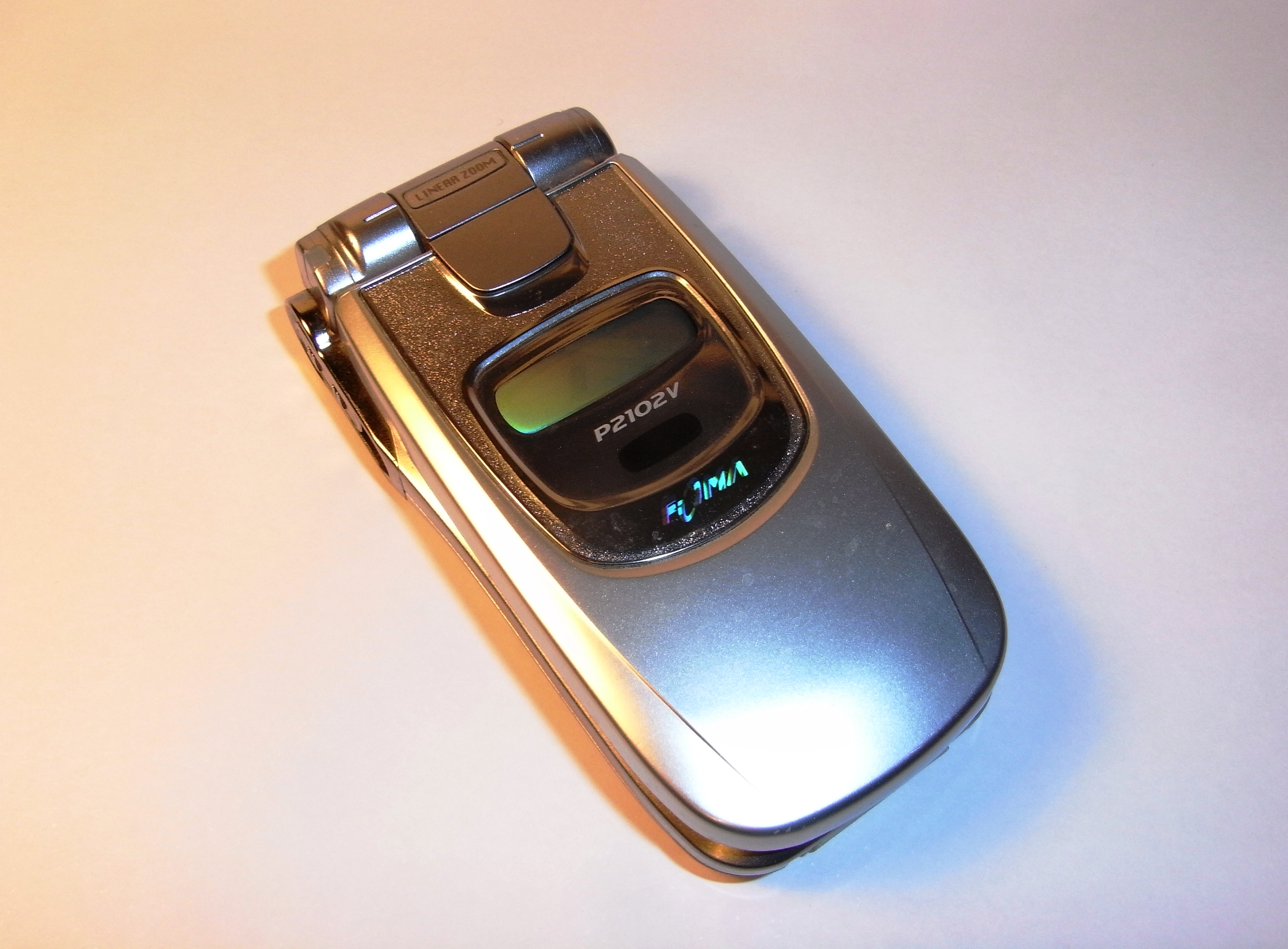 NTT docomo P2102V(P2102V